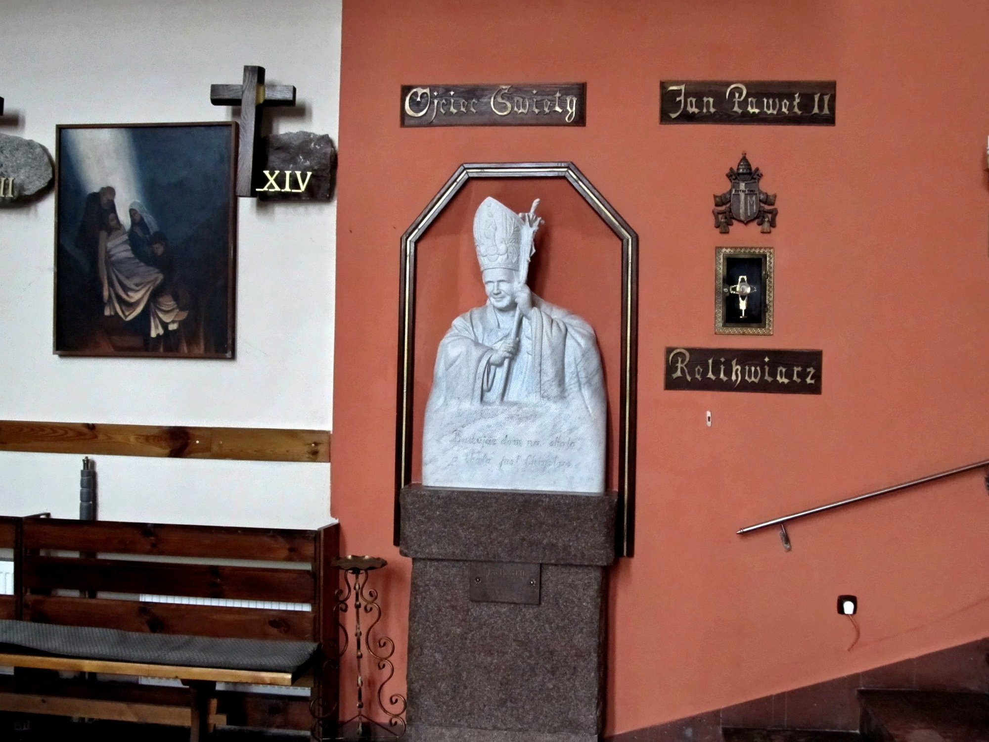 Boczna ściana kościoła z popiersiem św. Jana Pawła II oraz Jego relikwią